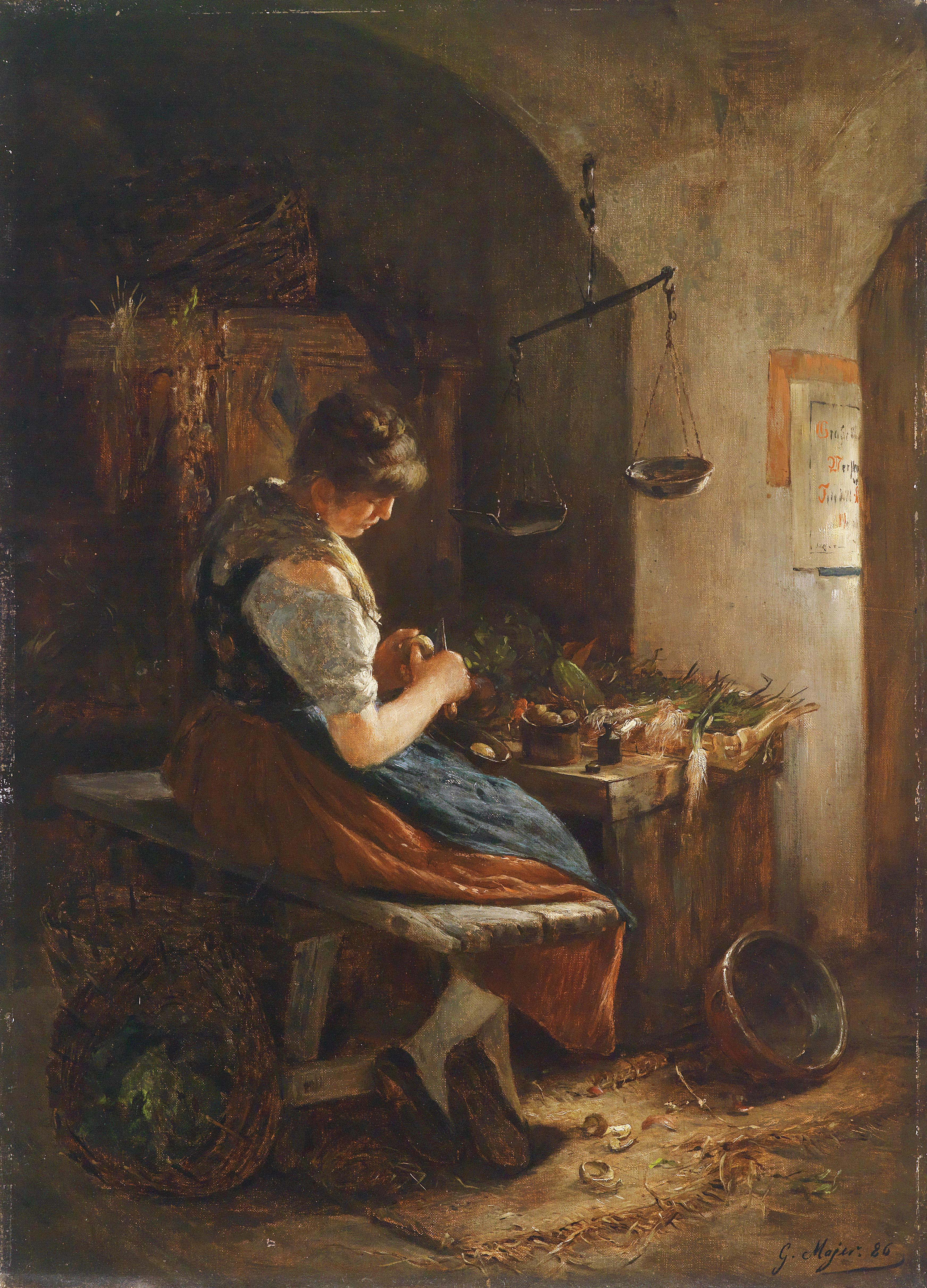 Mädchen in der Küchetitle QS:P1476,de:"Mädchen in der Küche"